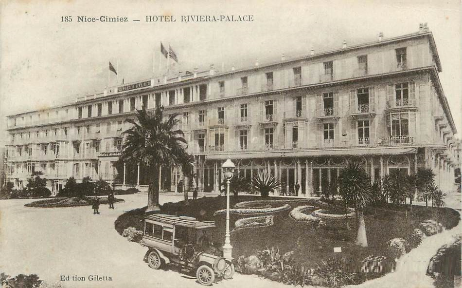 Hotel Riviera Palace de Nice (quartier d Cimiez) vers 1910